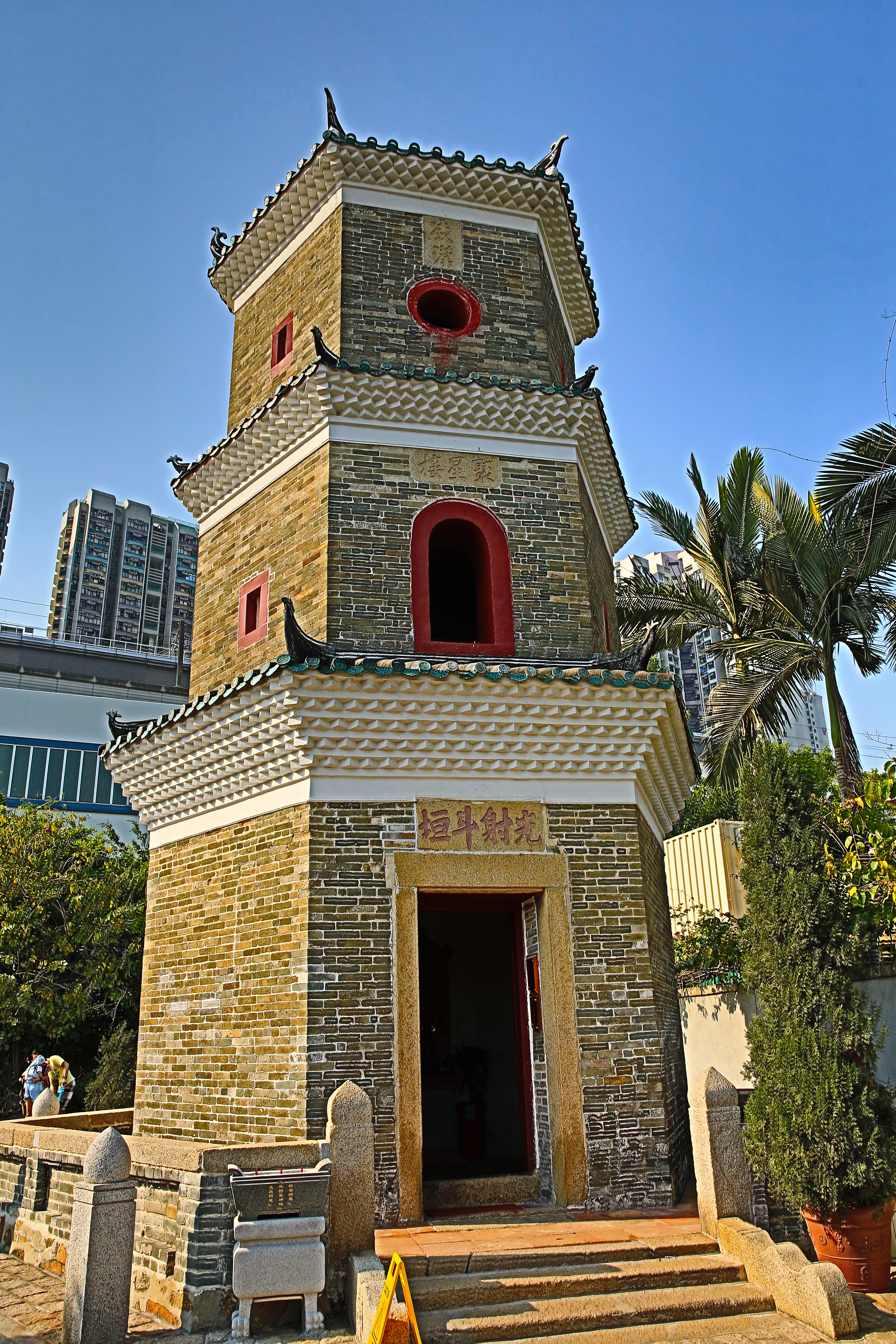 當地人稱之為文塔